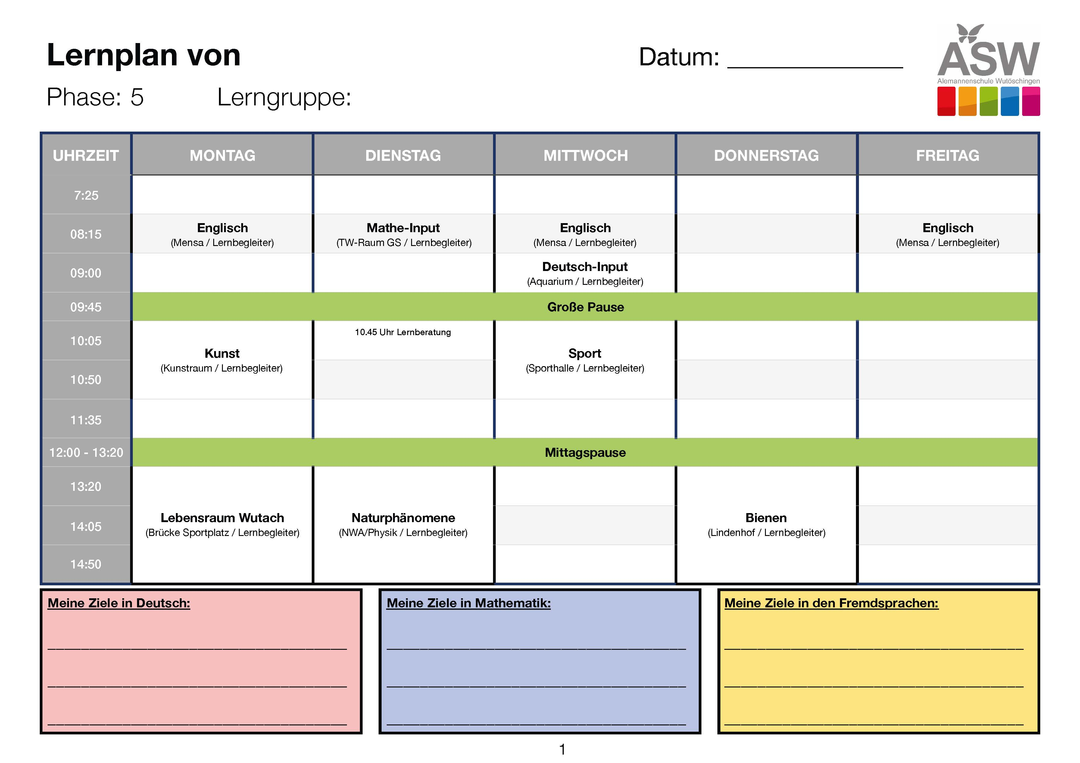 ASW Alemannenschule Wutöschingen. Grundschule und Gemeinschaftsschule mit integrierter gymnasialer Oberstufe in der Gemeinde Wutöschingen im Landkreis Waldshut in Baden-Württemberg. Formular eines Lernplanes.